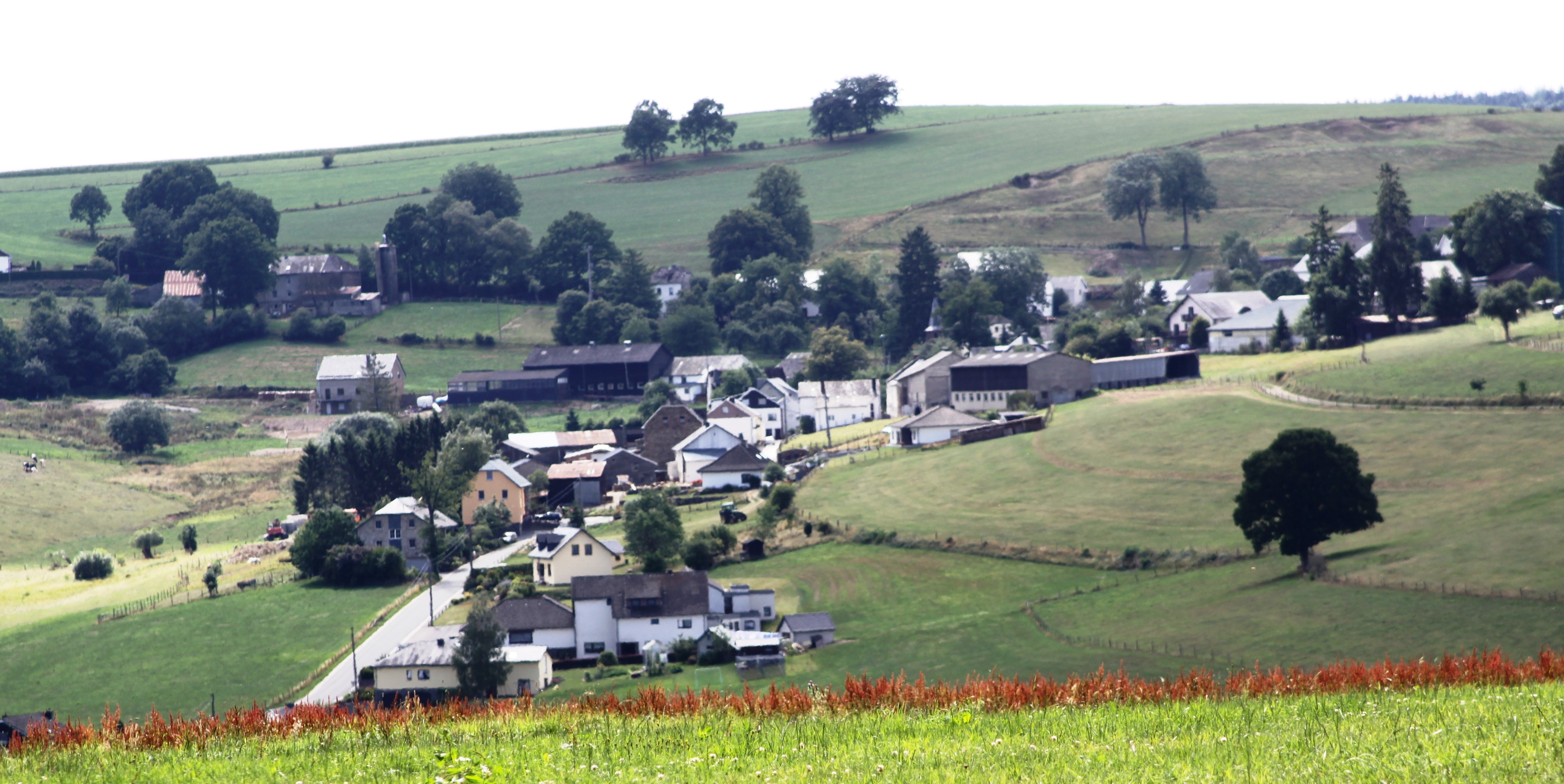 Lascheid, commune de Burg-Reuland, Province de Liège, vu de l'Est des hauteurs de Burg-Reuland